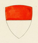 Stemma della famiglia Donati